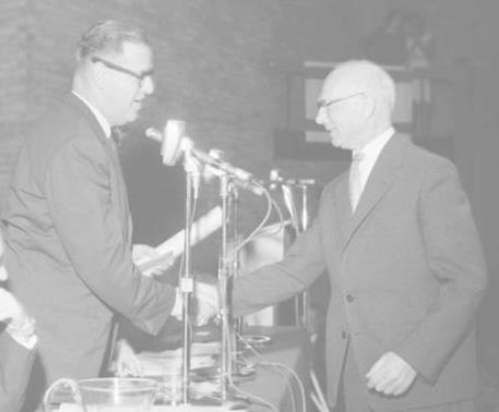 יצחק קנב מקבל פרס ישראל 1962 צלם יהודה איזנשטרק גנזך המדינה